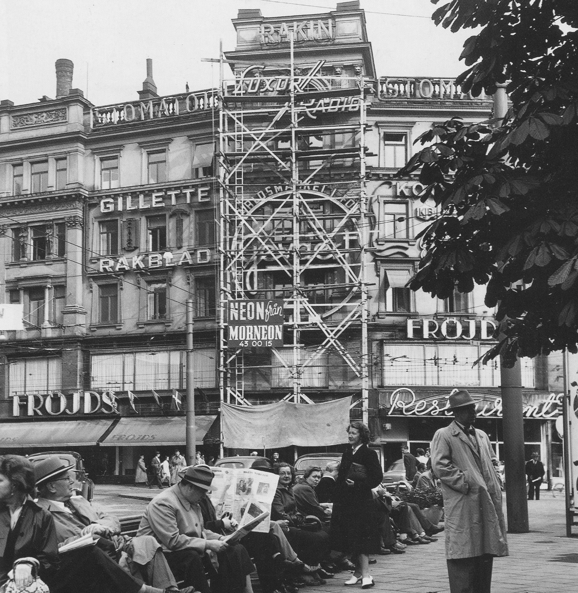 Morneons byggnadsställning i samband med montage av Gevaert-skylten